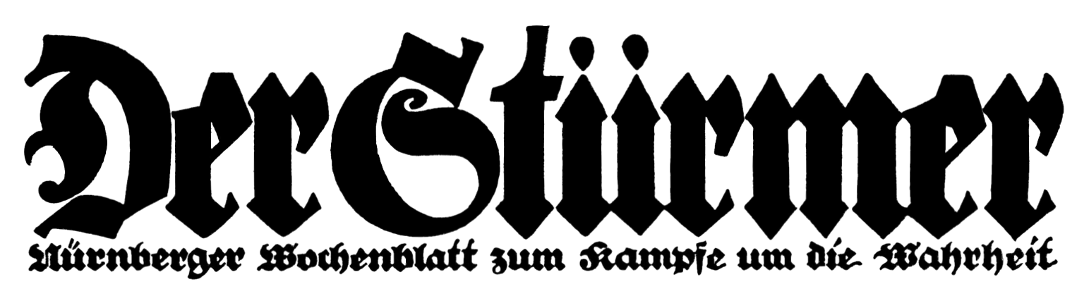 Logo der antisemitischen Wochenzeitung »Der Stürmer«